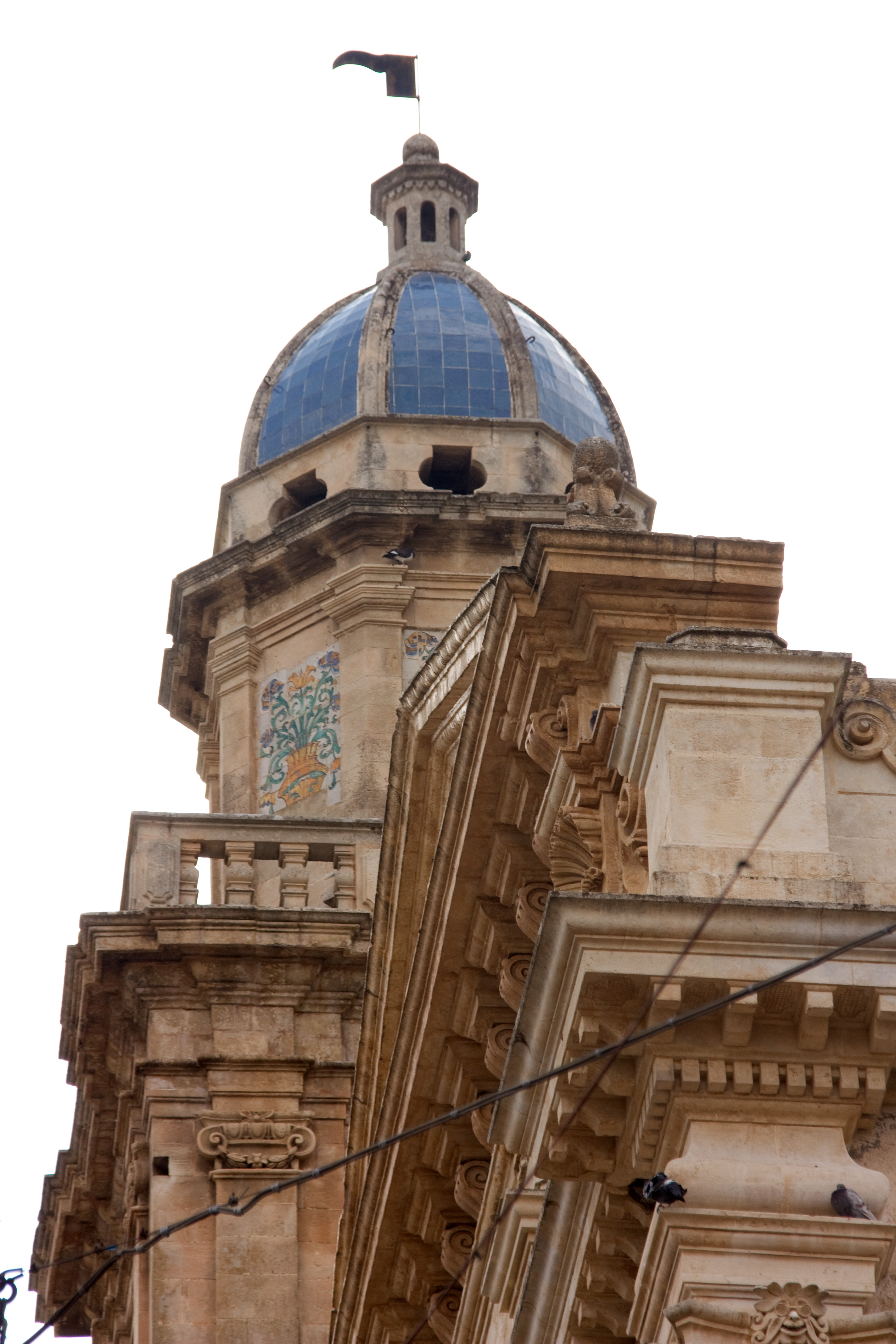 Chiesa Santa Maria dell'Idria, Ragusa Ibla, Sicile, Italie